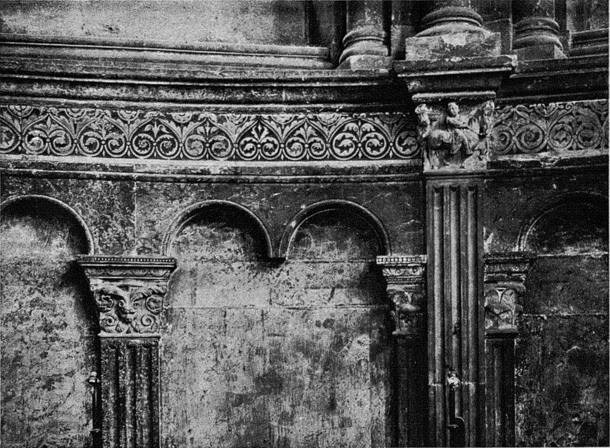 Arcature aveugle de l'abside de la Primatiale Saint-Jean à Lyon. Le fond de chaque arche est constitué d'une pierre de choin. Les arches supportent une frise gravée sur marbre blanc.